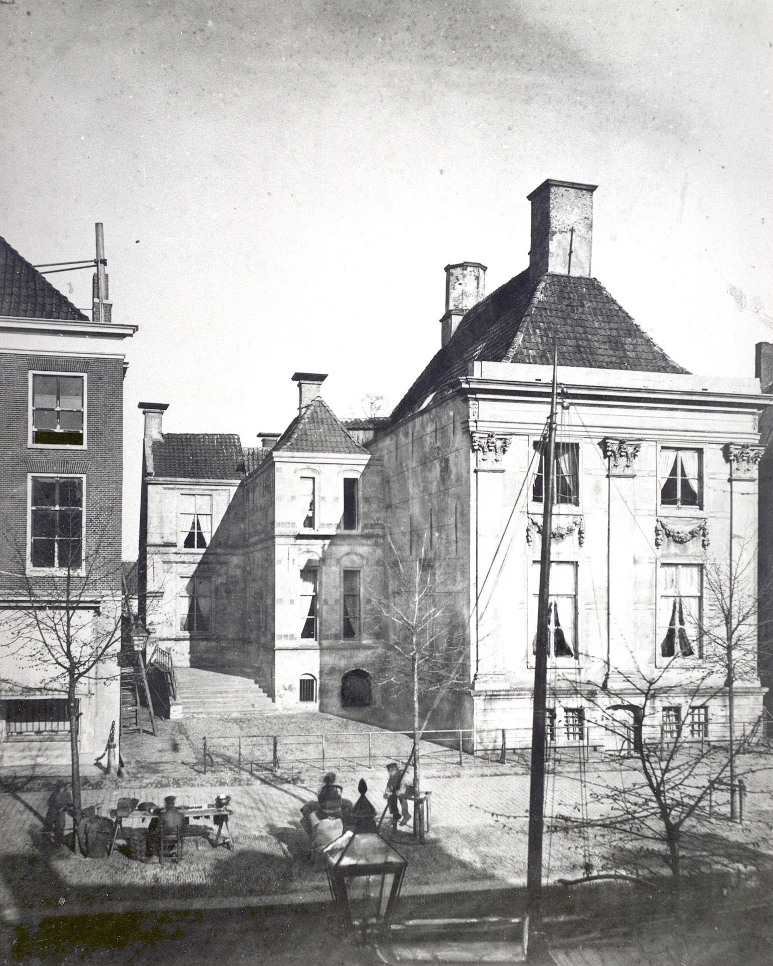 Ljouwert: It Amelânhûs oan de Foarstreek lyk foar de ôfbraak yn 1869